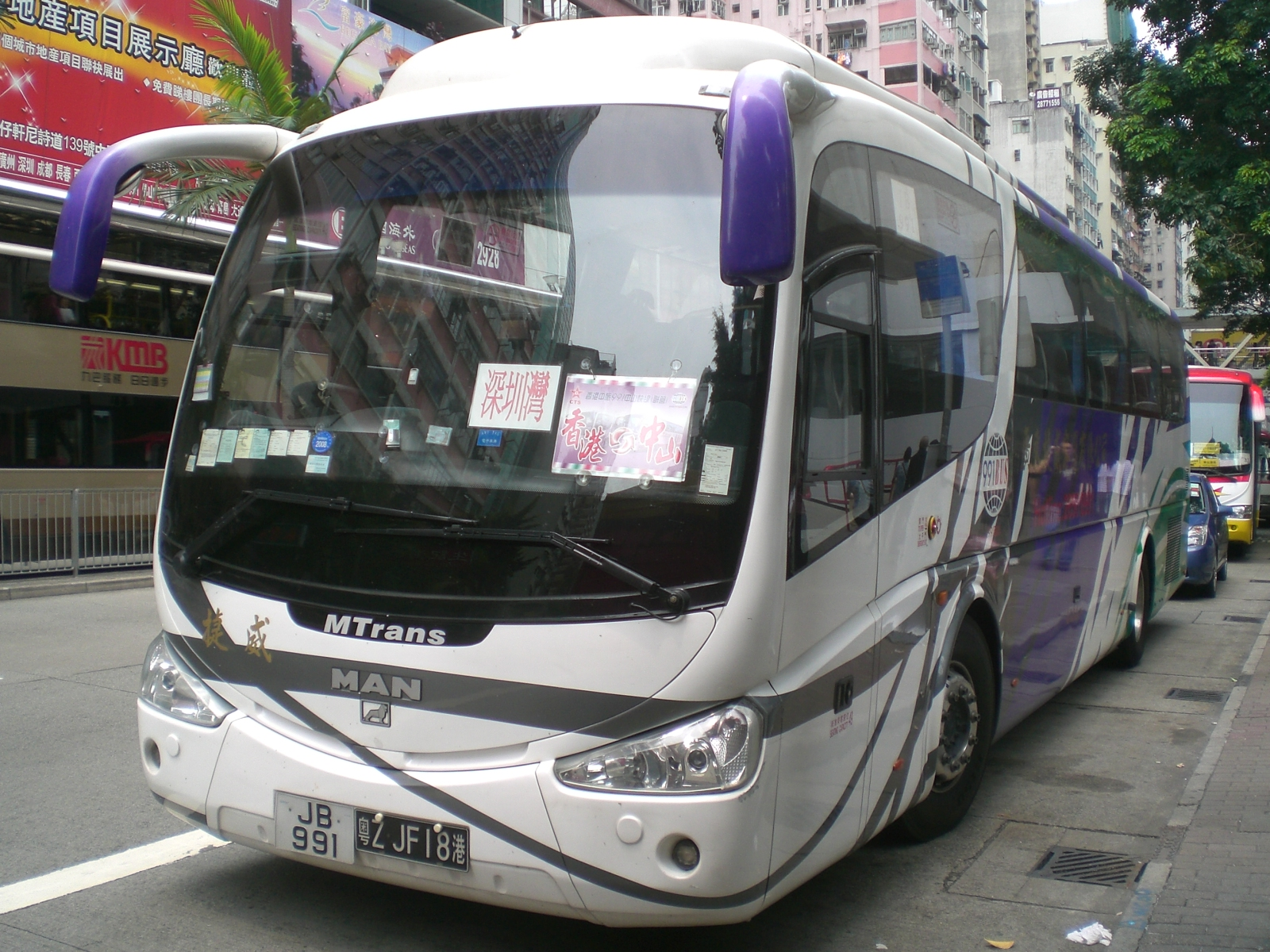 中文（香港）: 香港中旅汽車服務跨境巴士, 灣仔軒尼詩道近修頓中心